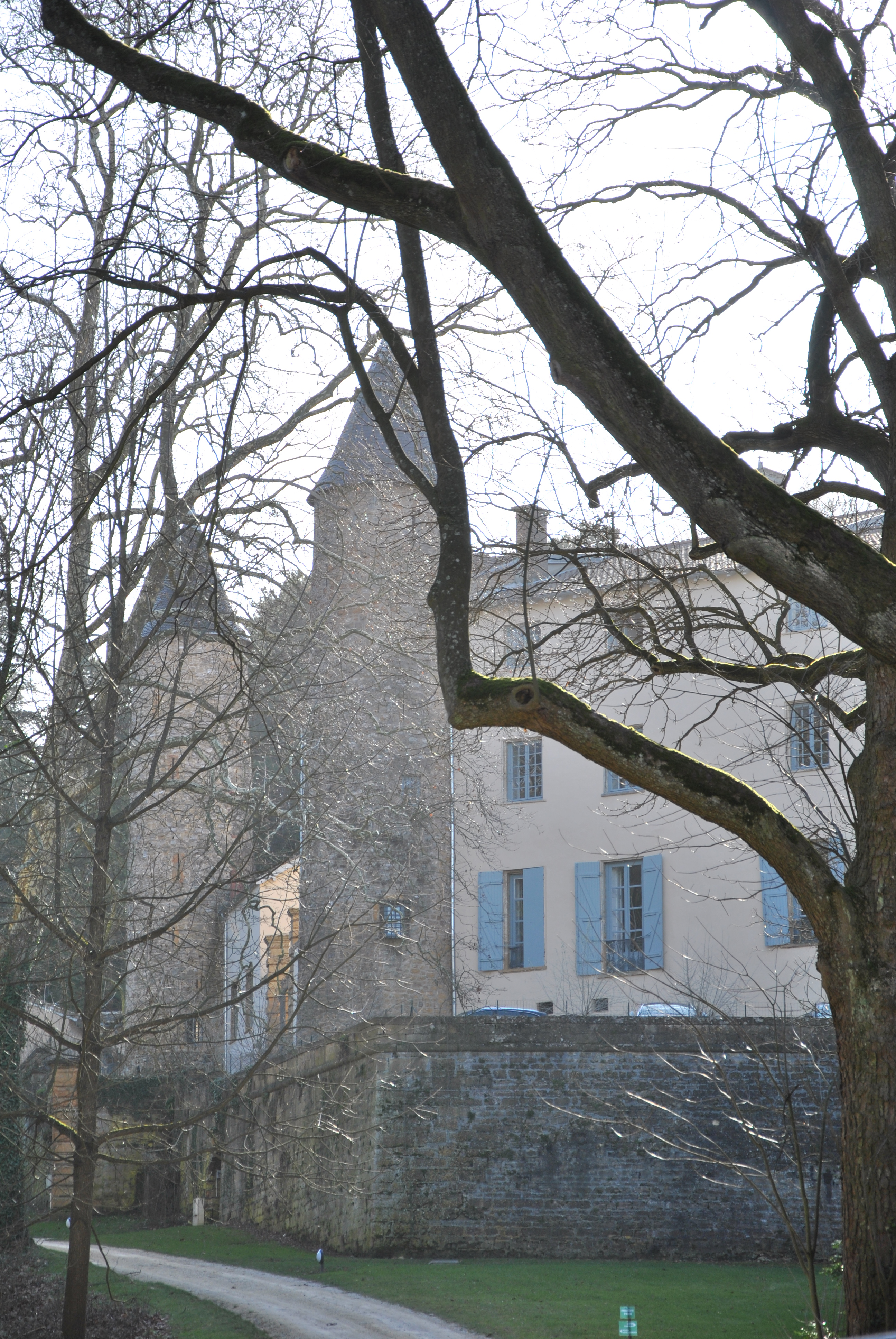 Vue Générale Chateau de la Trolanderie